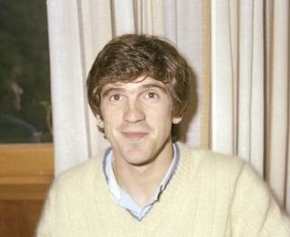 Luis Arconada in 1981